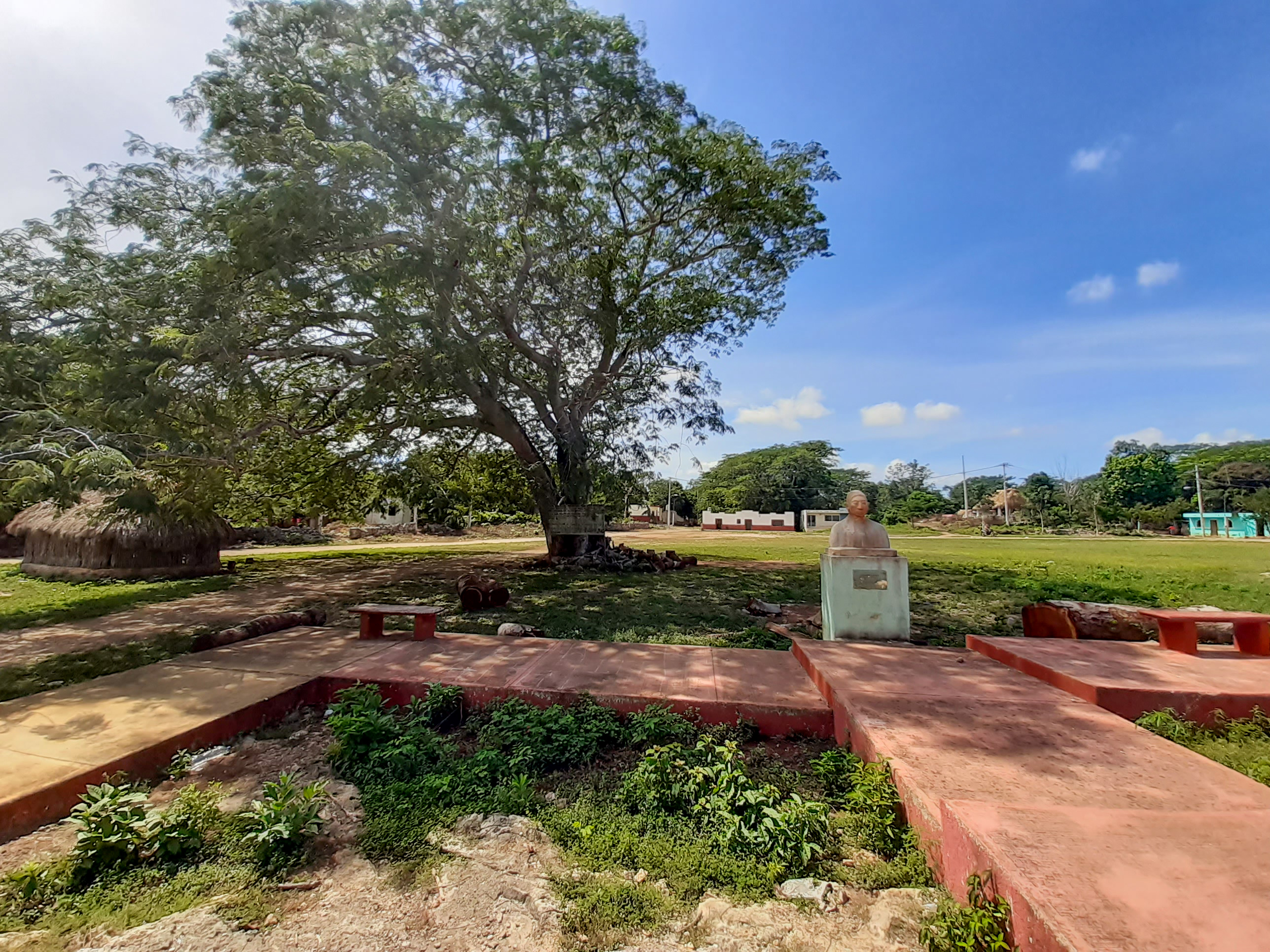 Cisteil, Yaxcabá, Yucatán.